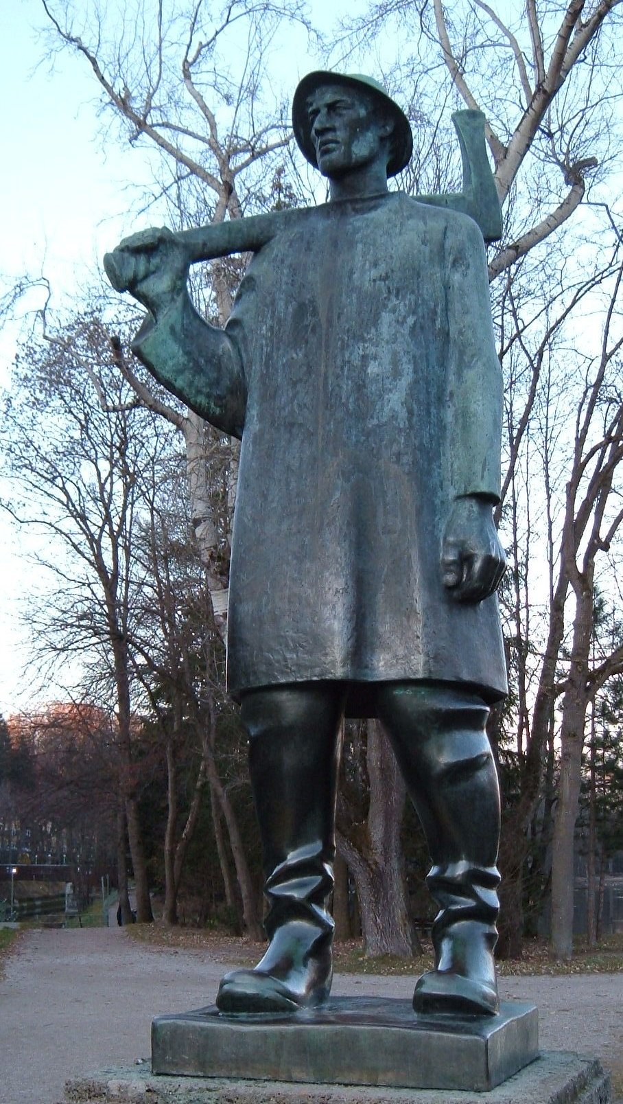 "Der Isarflößer", München